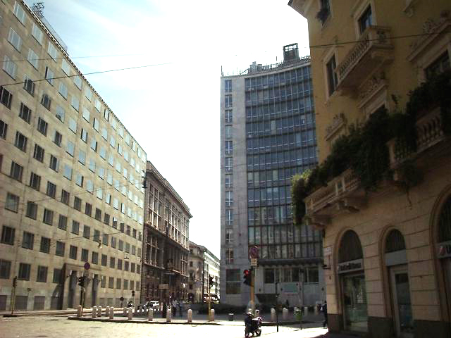 Template:Via Filippo Turati, Milano, Italy|Via Filippo Turati, Milano, Italy